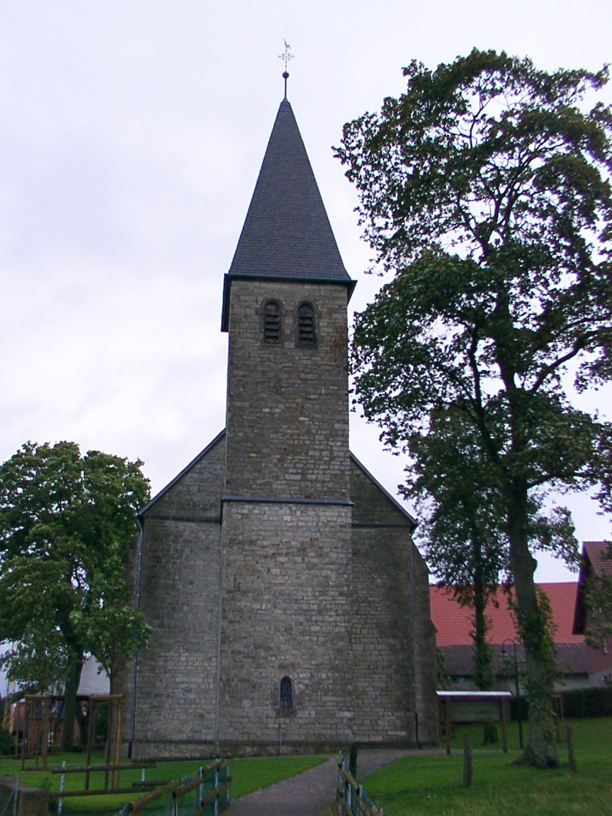 Bad Wünnenberg: Kath. Kirche Sankt Apollonia in Helmern